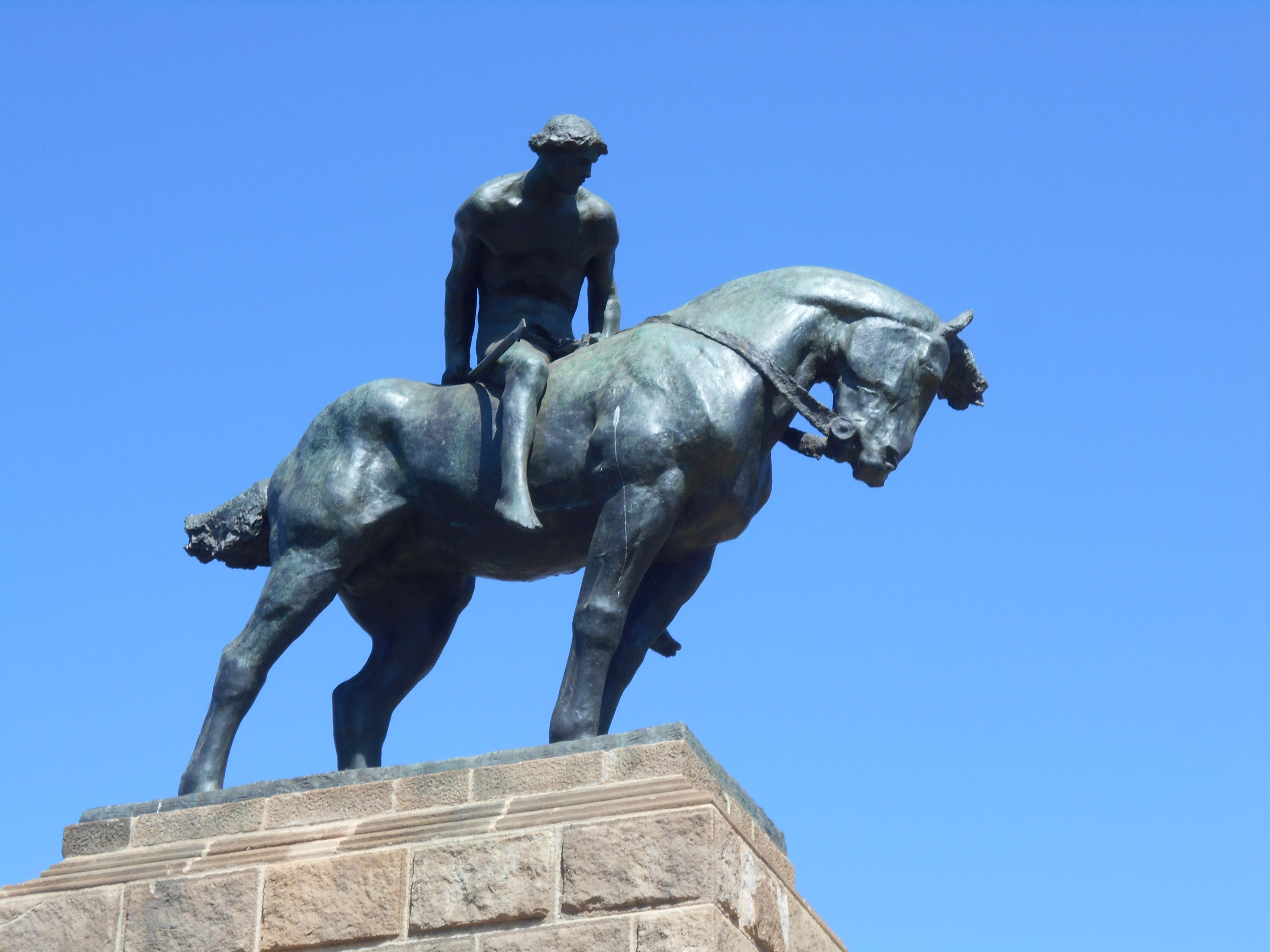 San Jorge, de Josep Llimona.